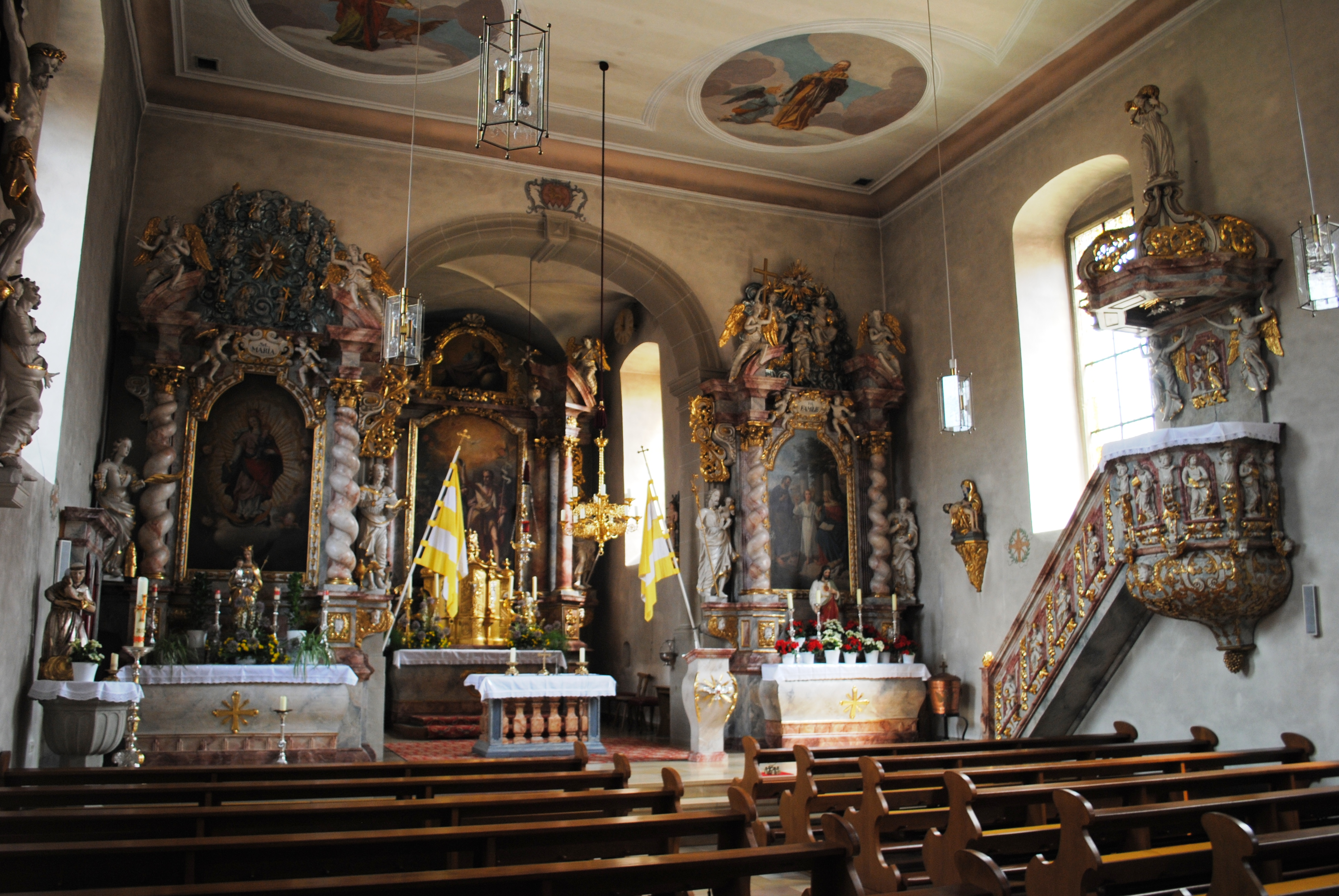 Innenraum, Kirche, Fahr